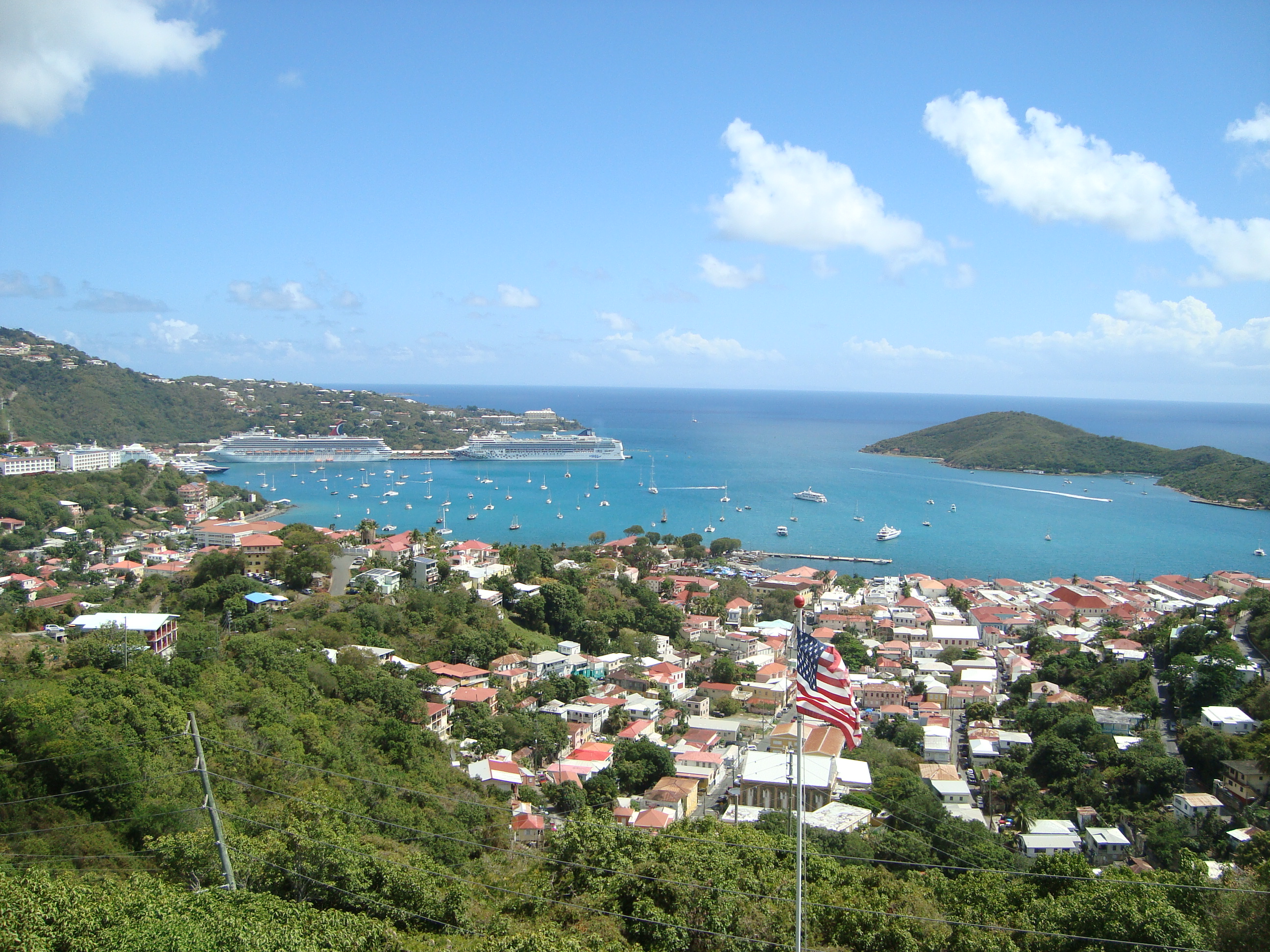 Charlotta Amalie, St. Thomas